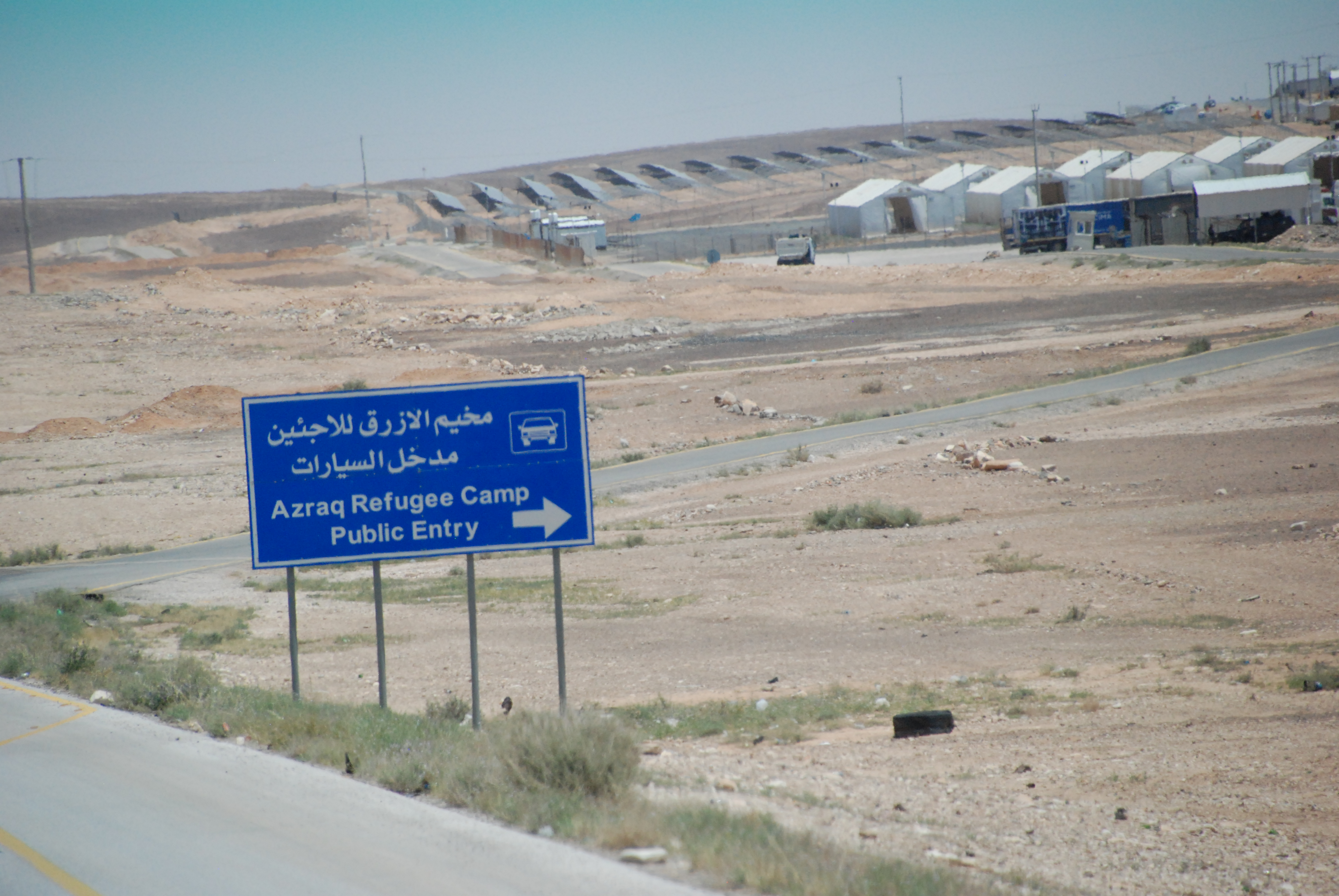 Camp de réfugiés syriens d'Azrac